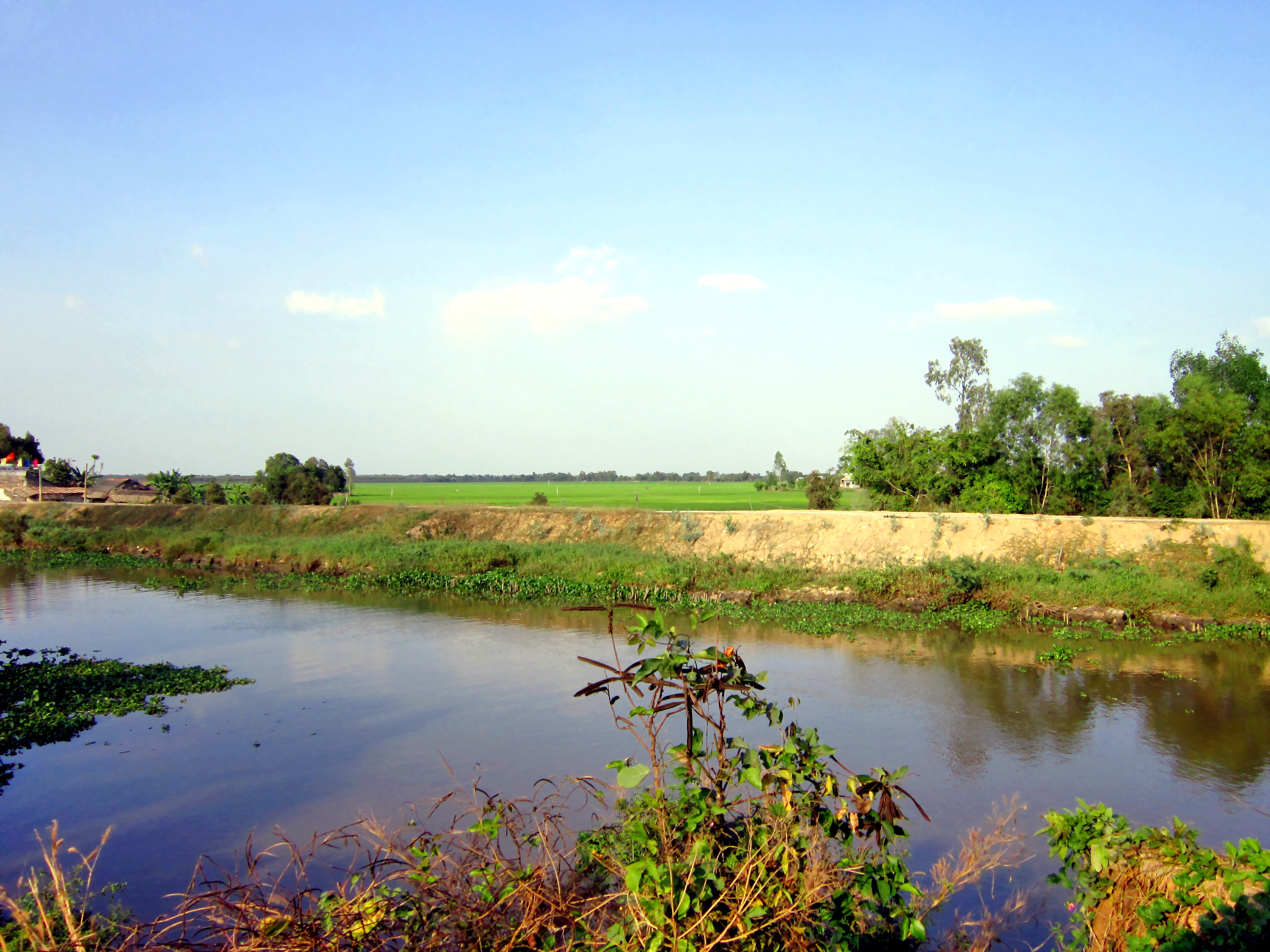 Một cảnh nông thôn ở xã Tân Kiều, huyện Tháp Mười, tỉnh Đồng Tháp, Việt Nam.